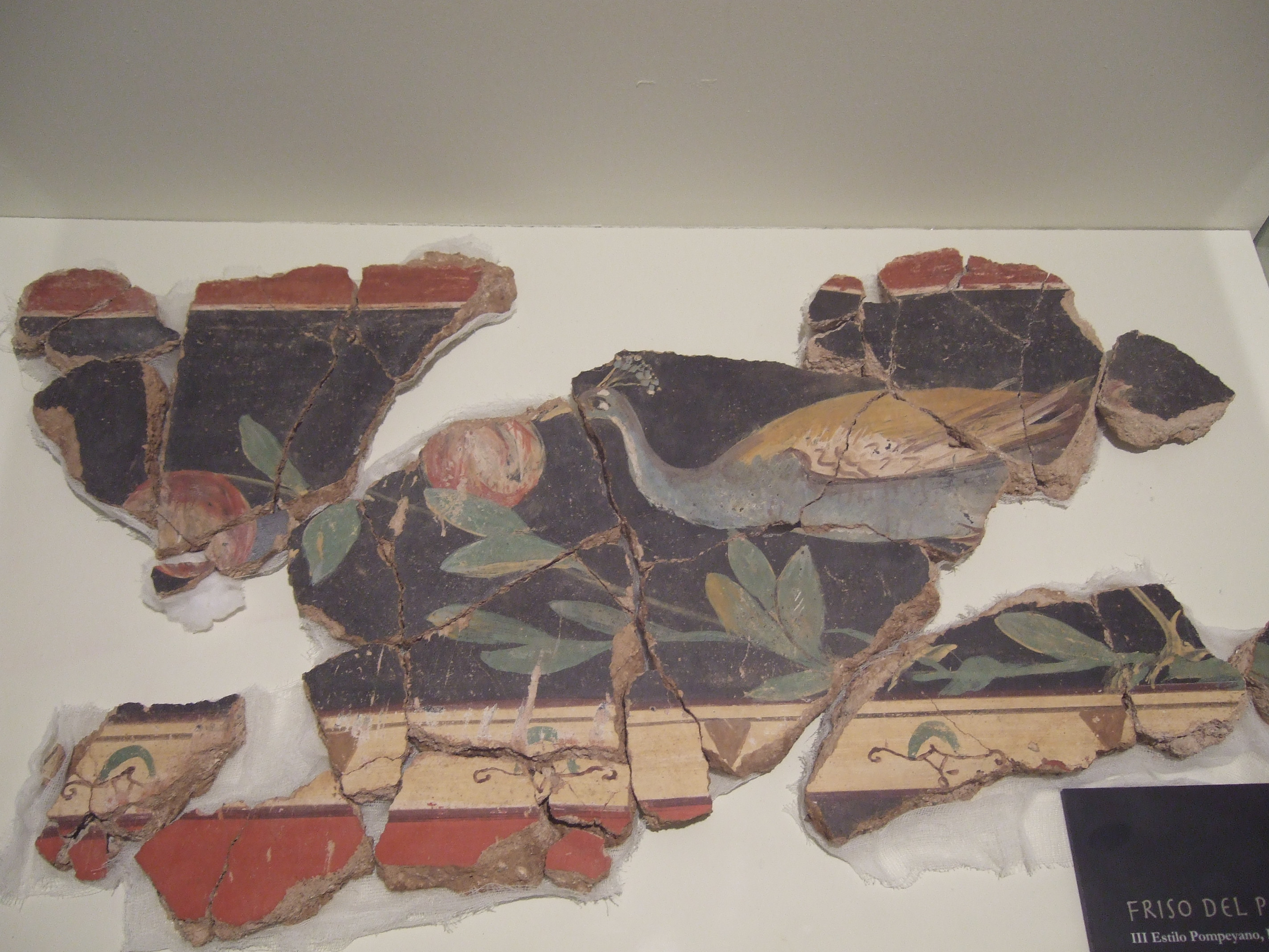 Museo de Calatayud - Friso del Pavo Real - Restos de pintura - Primera mitad del siglo I ddC - Bílbilis, Barrio de las termas - Insula I, Domus 3. stancia 29